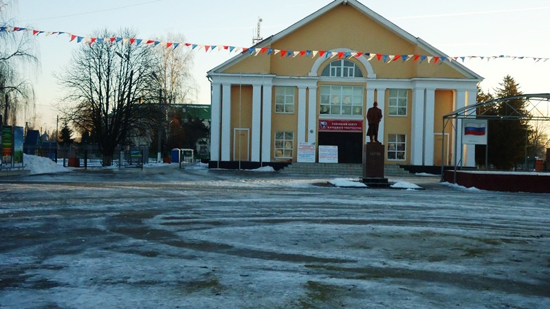 Советская плошадь.г.Суджа. Сделана на прогулке 2012-12-31